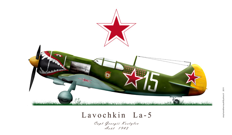 Lavockine La 5 avion de chasse russe seconde guerre mondiale